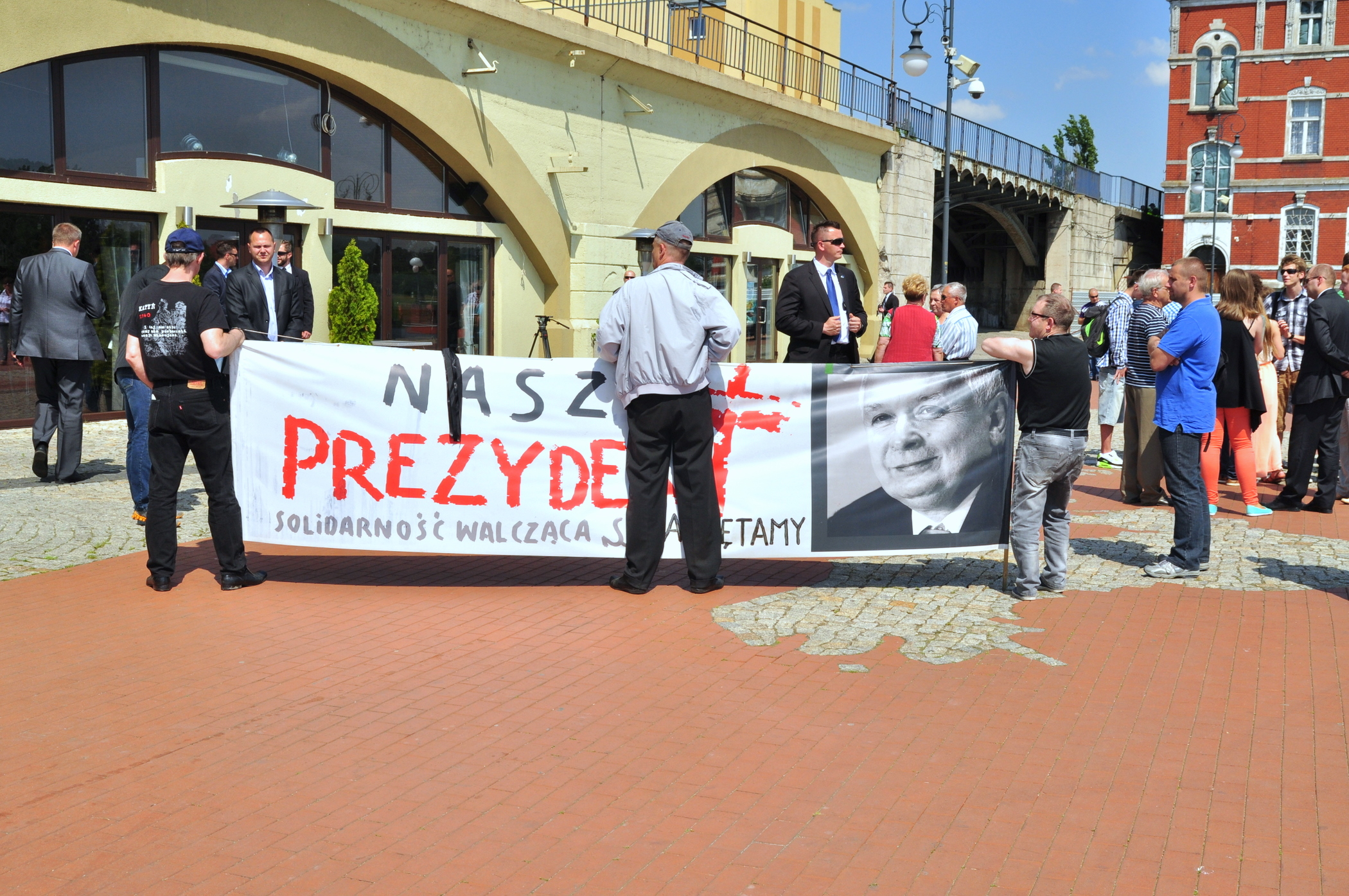 Gorzów Wlkp., Bulwar nadwarciański. Pikieta przed jednym z lokali gastronomicznych w którym przebywa premier Donald Tusk